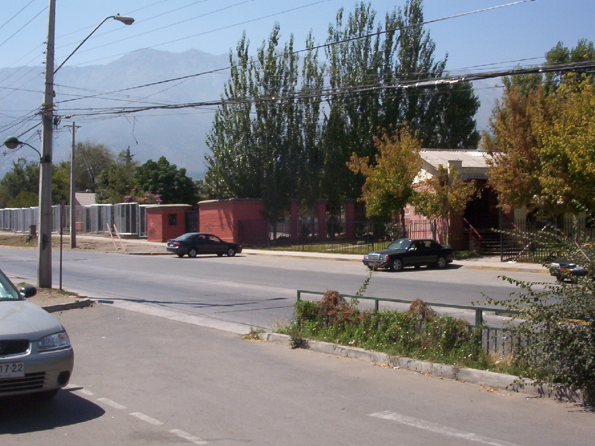 Foto tomada desde la Capilla Nuestra Señora de Loreto, 3 de marzo de 2007